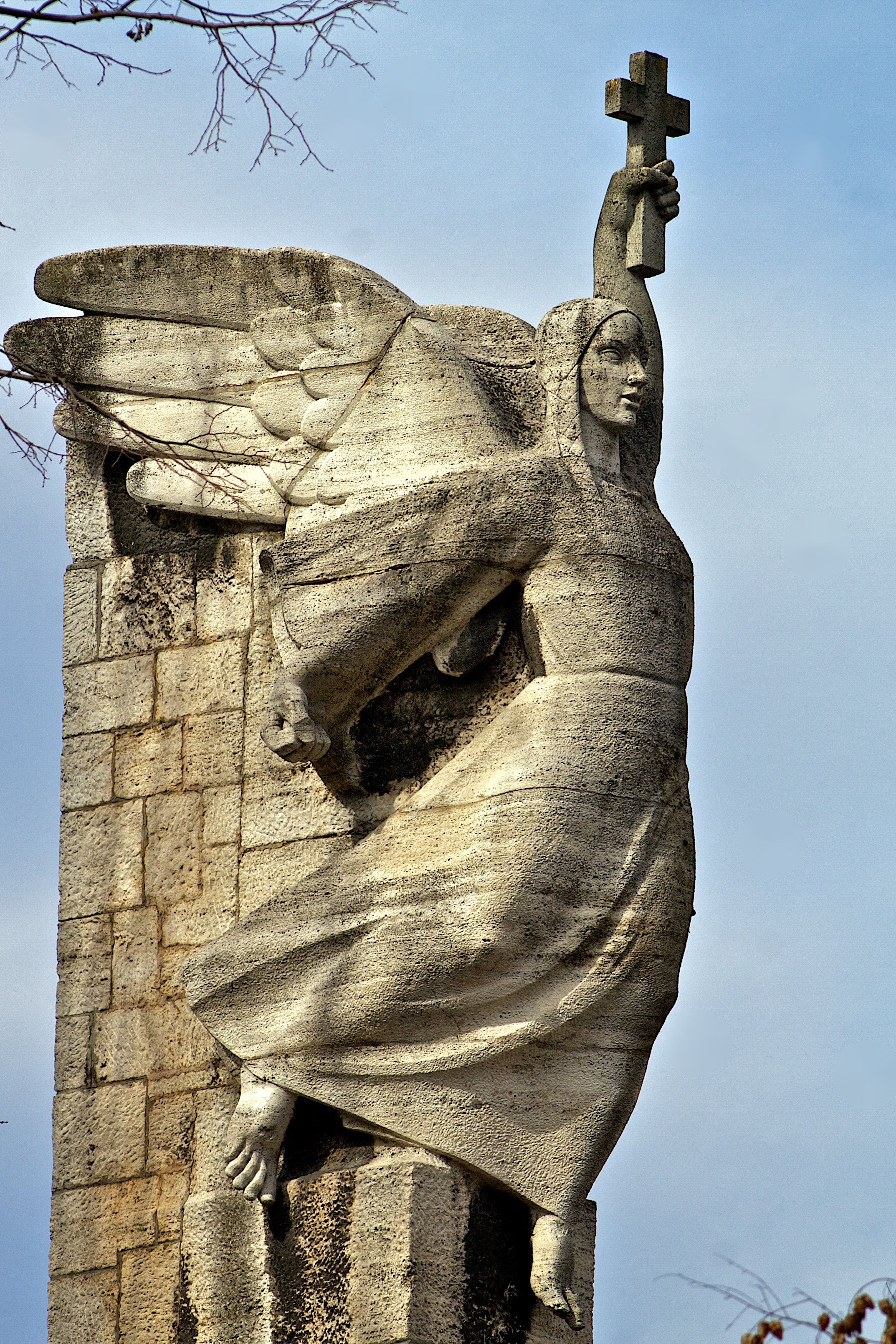 Székesfehérvár